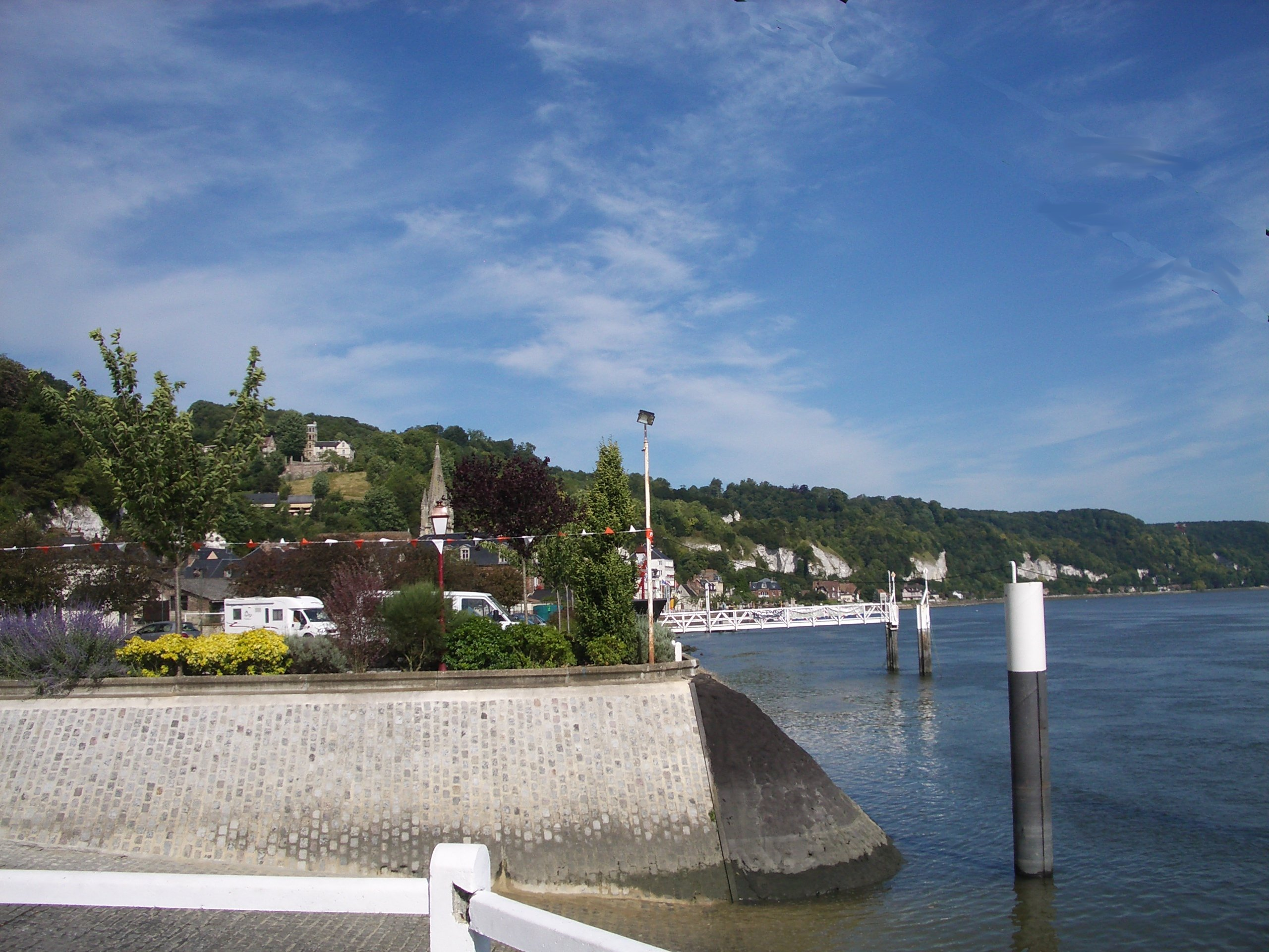 La Bouille (Seine Maritime) l'embarcadère du bac